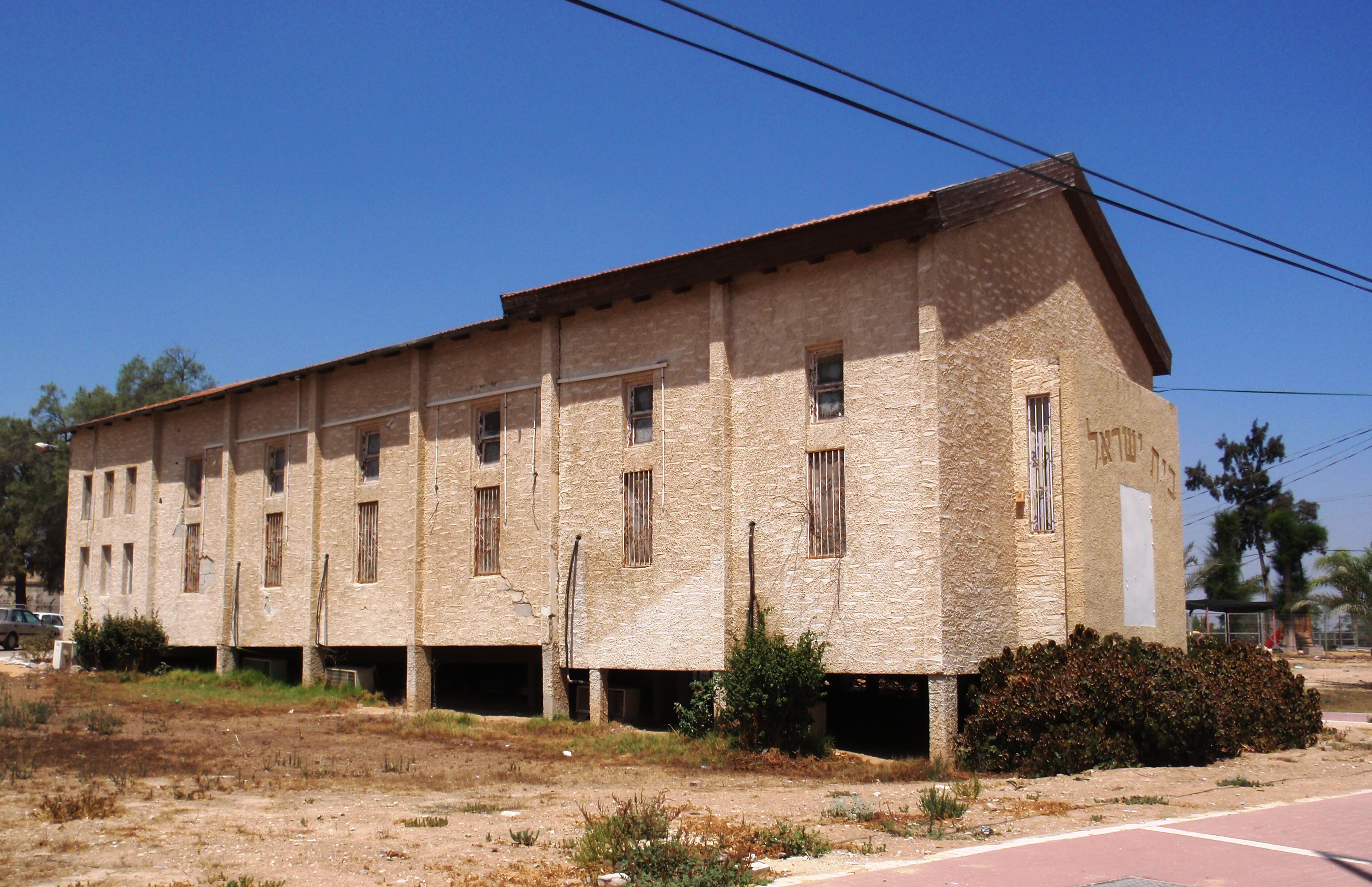 Moshavim בית הגדי בית הכנסת הישן